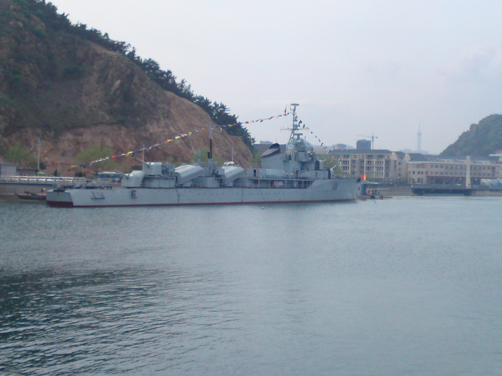 鞍山級駆逐艦太源（#104） 大連老虎灘て撮影 携帯カメラで撮影したためボケ気味。とりあえずUPしますが、もっと良い写真があれば差し替え願います